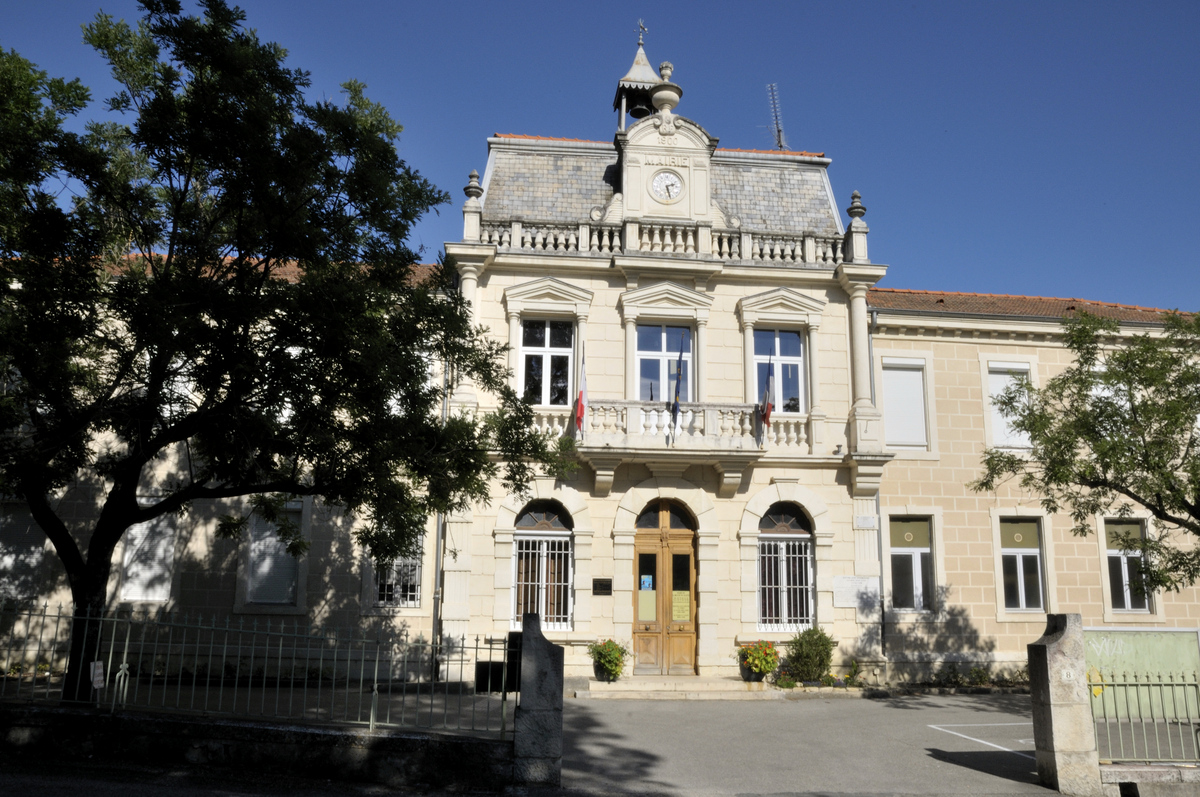 la mairie